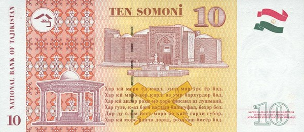 Тоҷикӣ: 10 сомонӣ